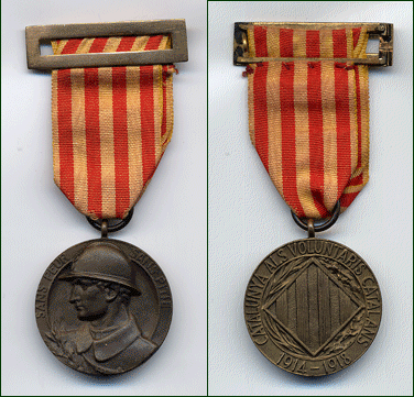 Medalla no oficial als Volutnaris Catalans